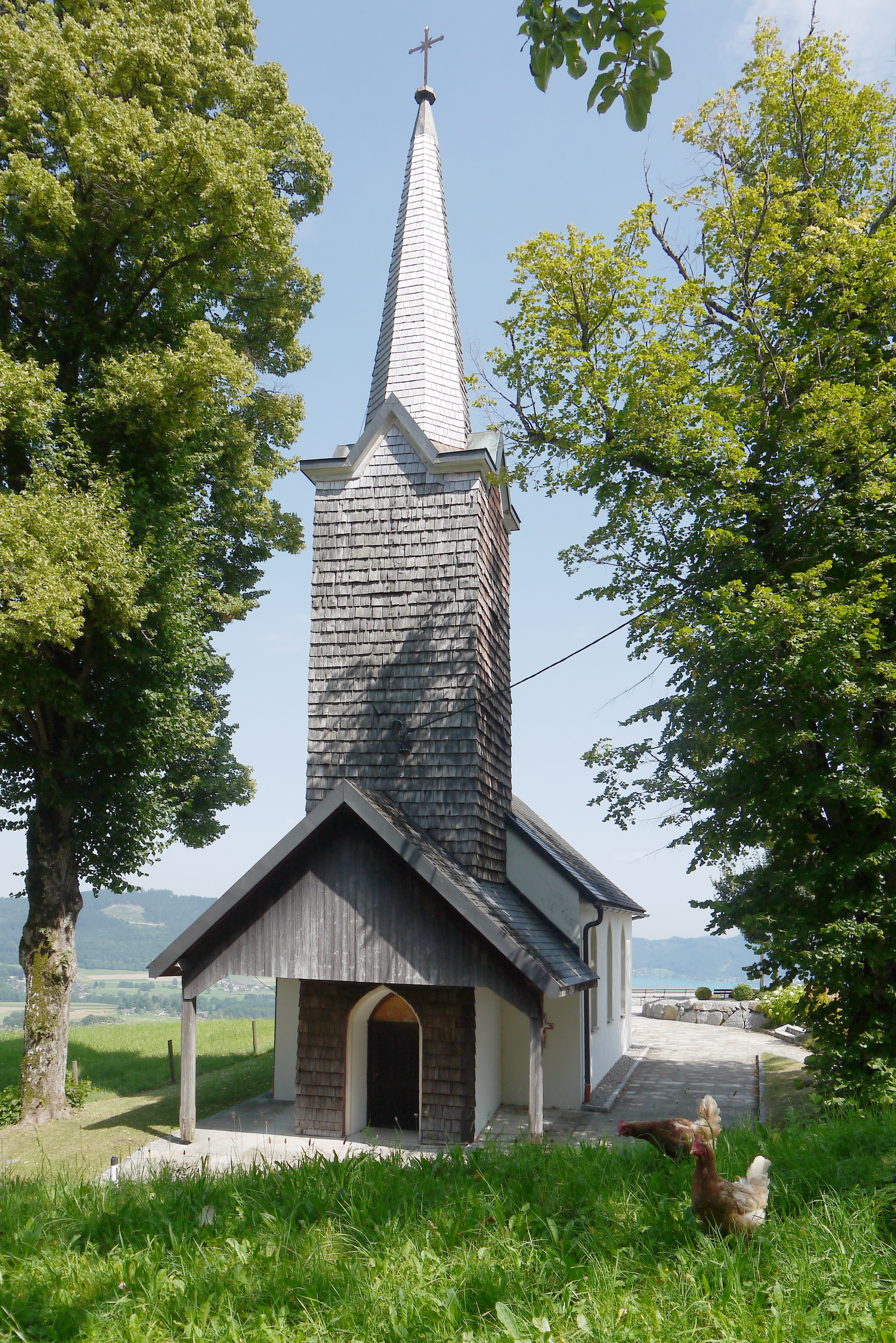 Wegkapelle Maria zur immerwährenden Hilfe/Kronbergerkapelle